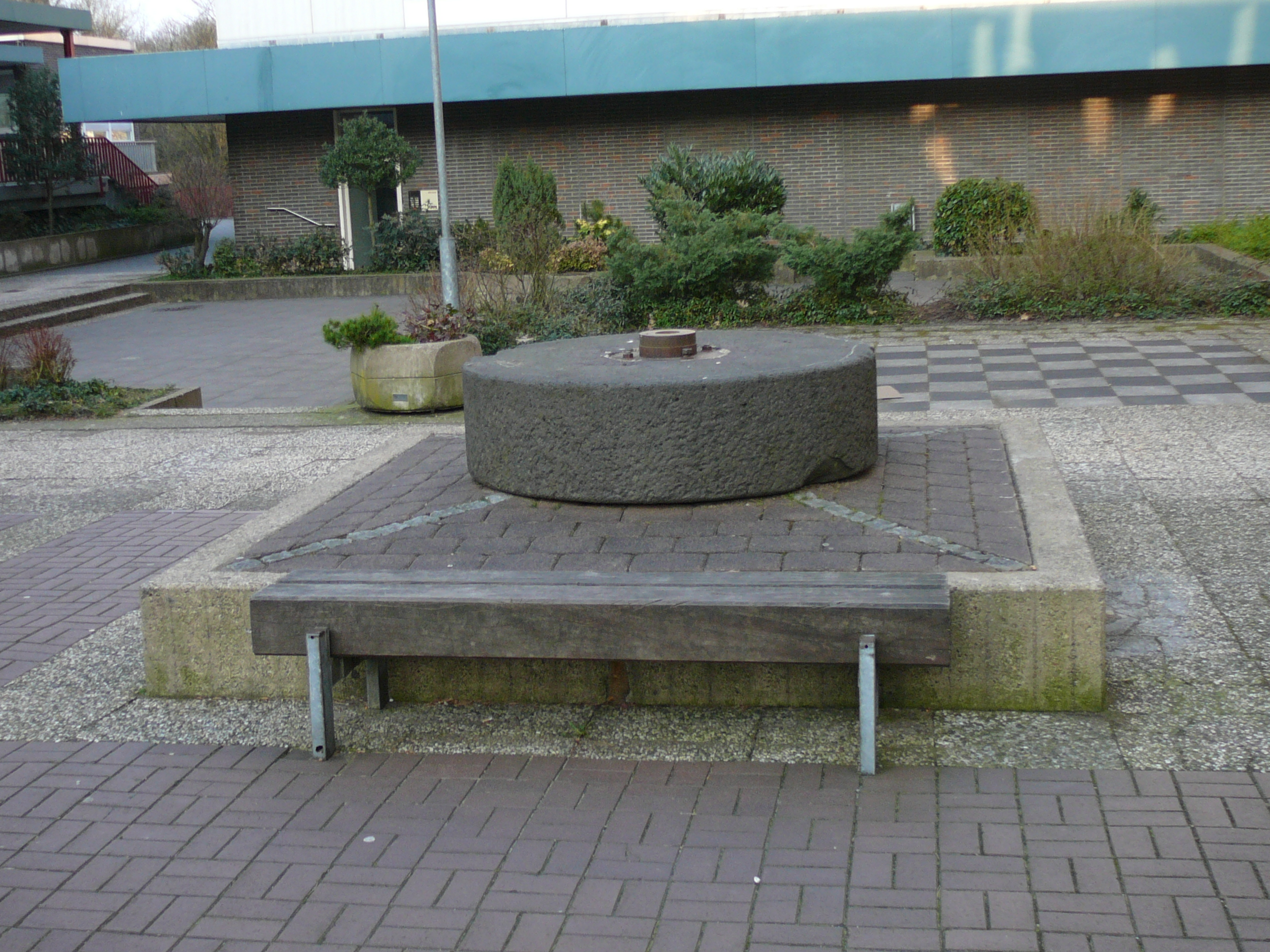 Röttgen, Wuppertal